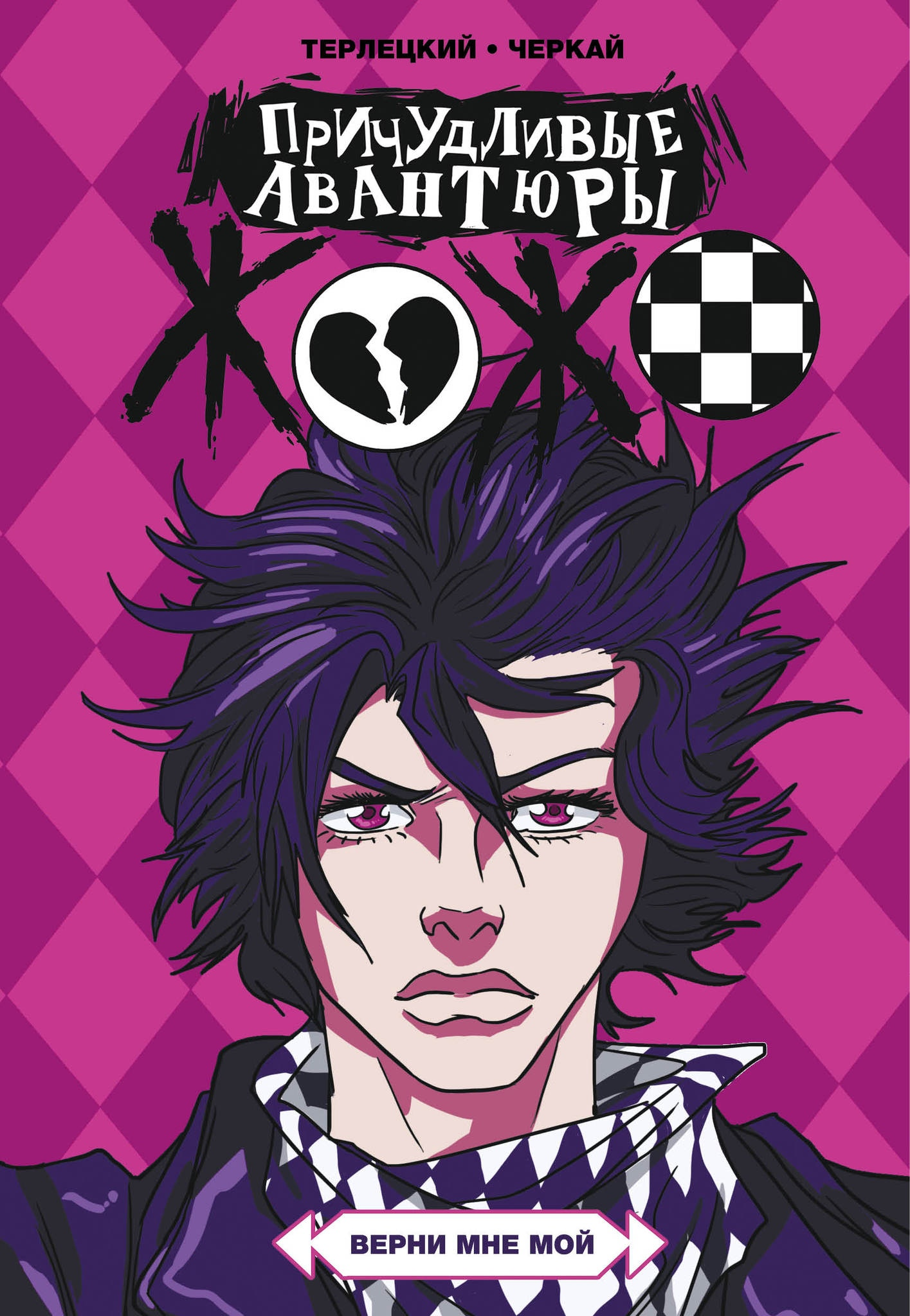 Обложка додзинси по манге JoJo's Bizarre Adventure.